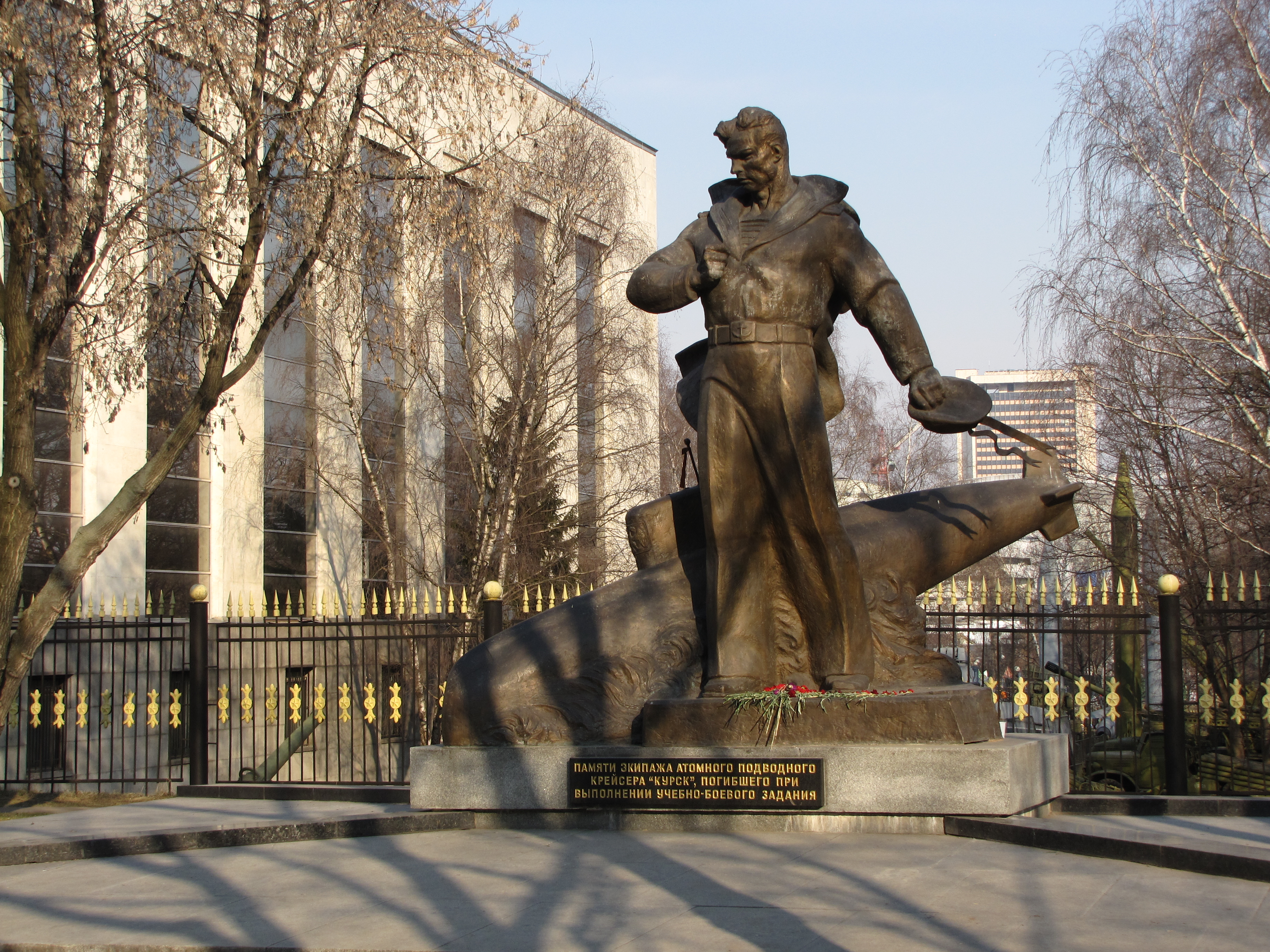 Памятник экипажу подводной лодки «Курск»